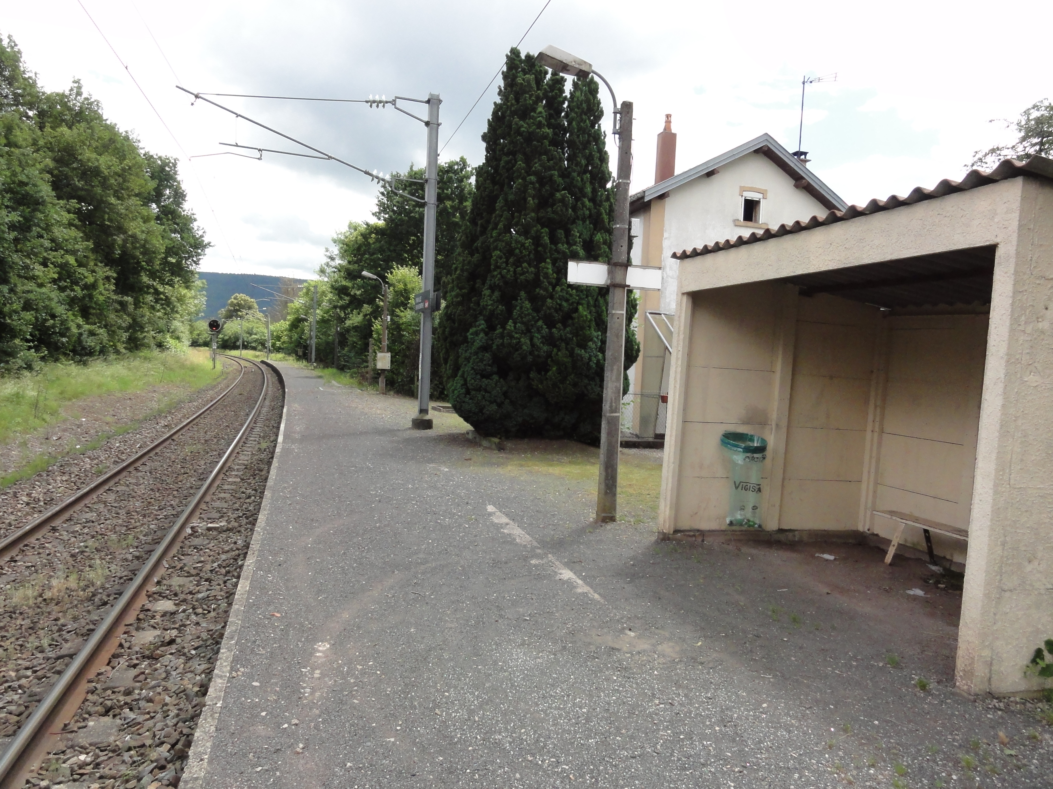 Thiaville-sur-Meurthe (M-et-M) la gare